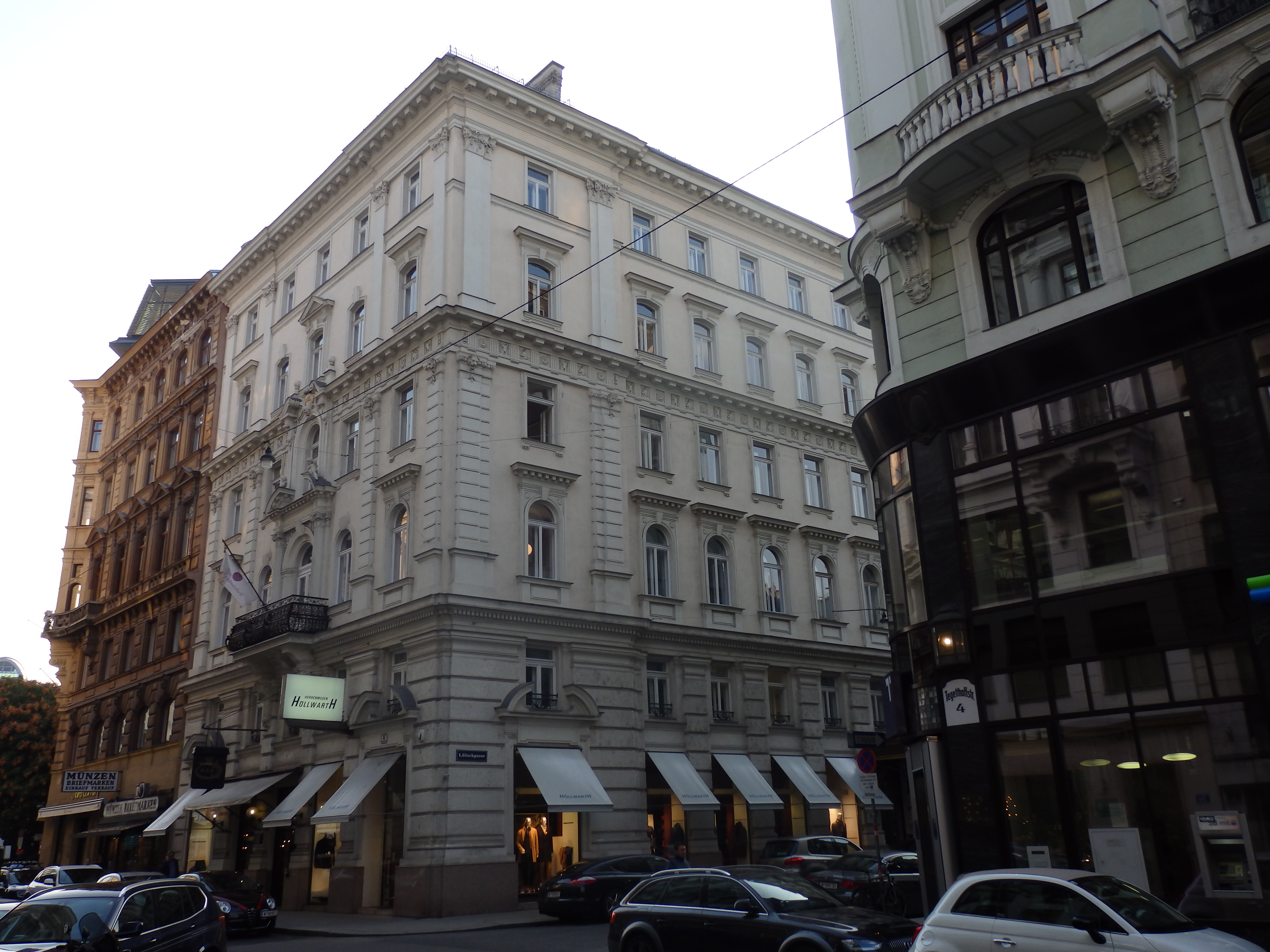 Wohnhaus (1885) von Josef Hudetz, Gluckgasse 1, Wien-Innere Stadt